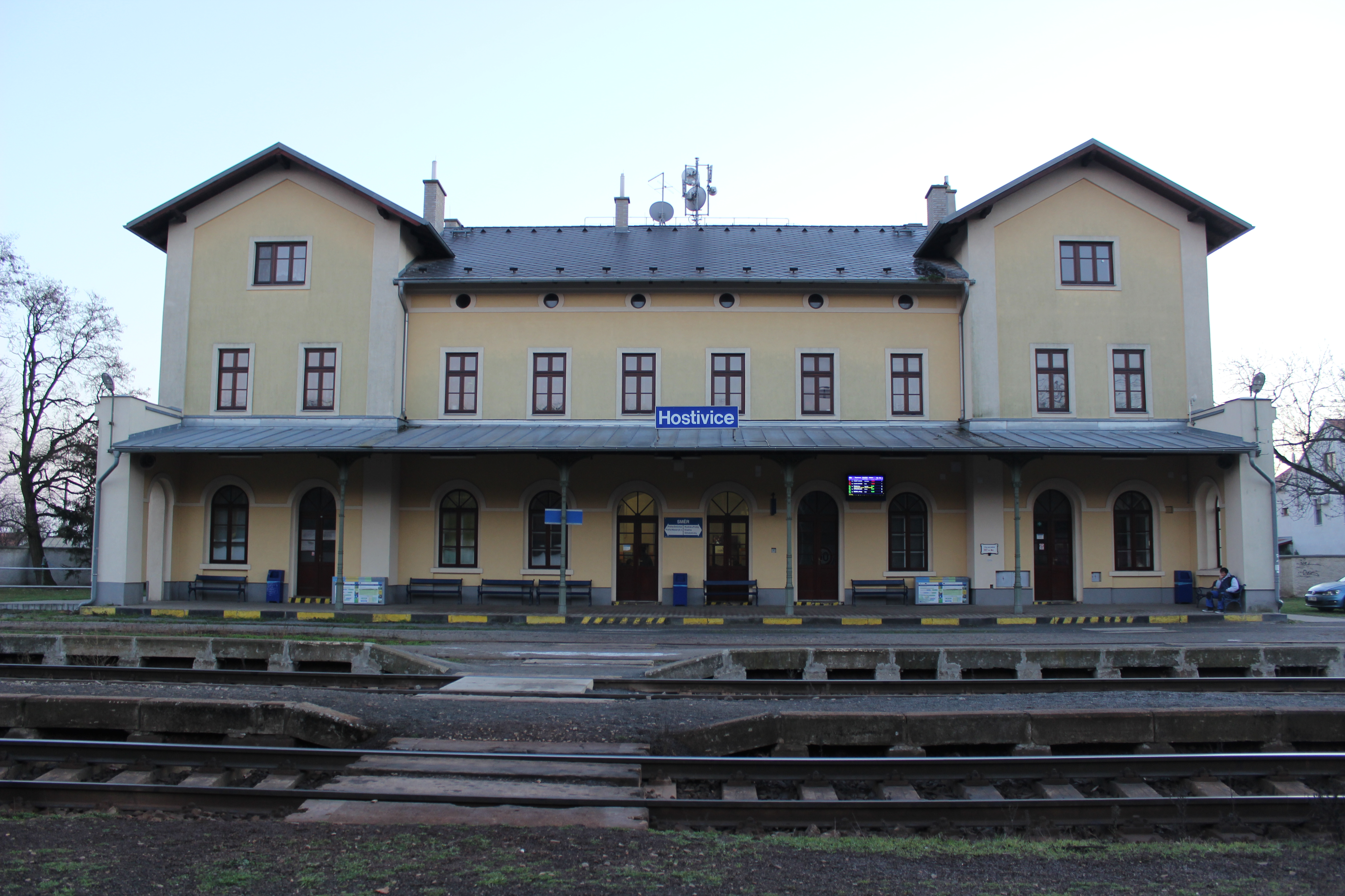 Staniční budova v železniční stanici Hostivice.